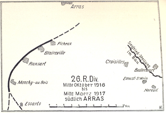 Karte Seite 61: 26. R.D. Mitte Oktober 1916 bis Mitte März 1917 südlich Arras